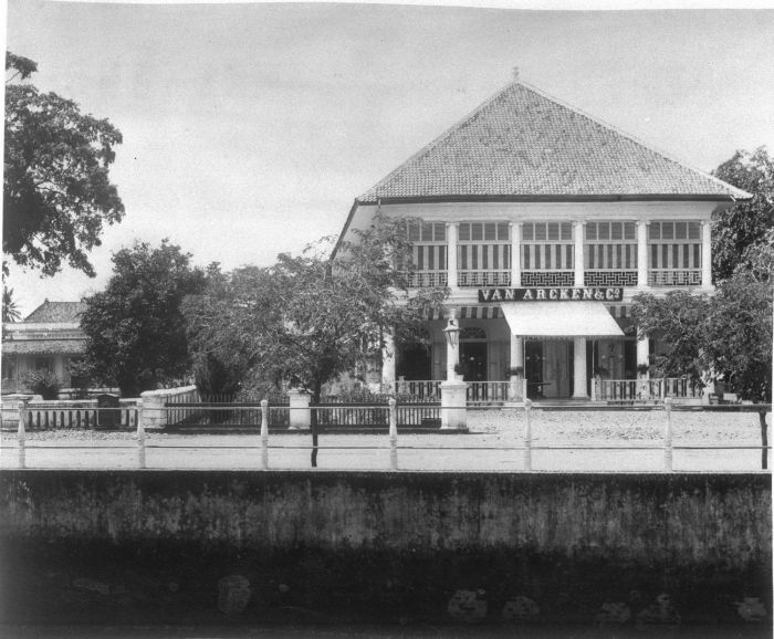 Foto. De winkel Van Arcken & Co. aan de Molenvliet in Noordwijk te Batavia, West-Java circa 1880.